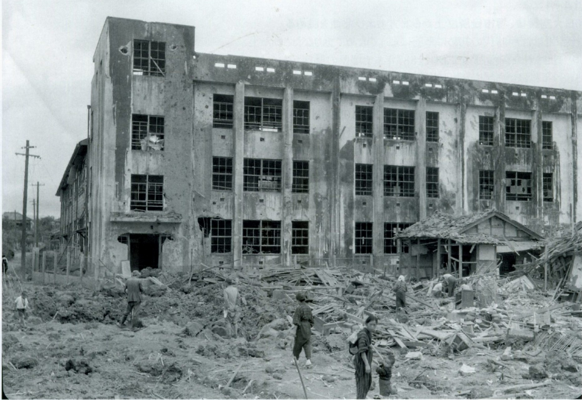 昭和20年6月7日の空襲(第3回大阪大空襲)で付近に落ちた爆弾で被害を受けた桜塚国民学校(現・豊中市立桜塚小学校)校舎。